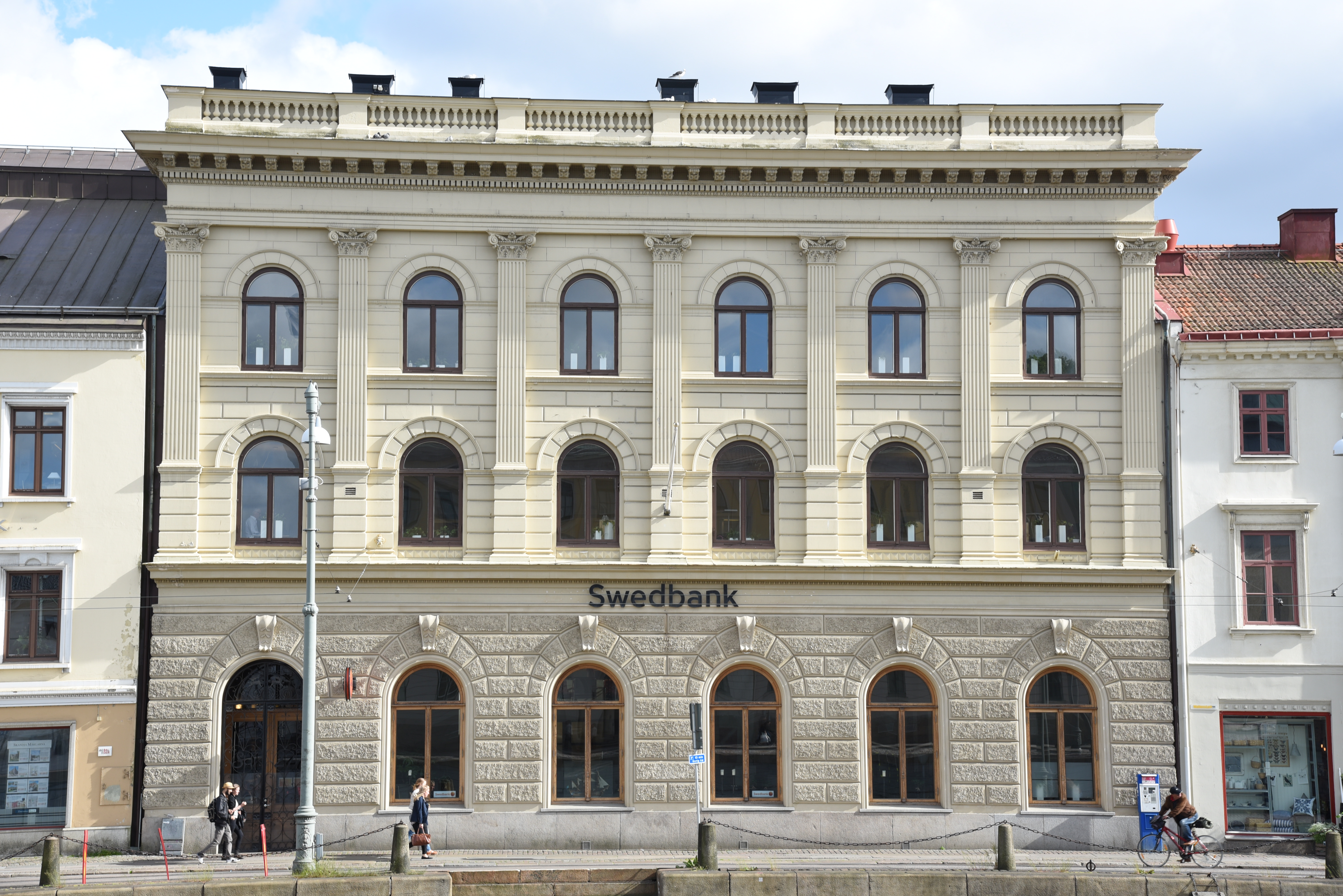 Södra Hamngatan 27 i 15 kvarteret Frimuraren i stadsdelen Inom Vallgraven i Göteborg, f.d. Riksbankshuset.